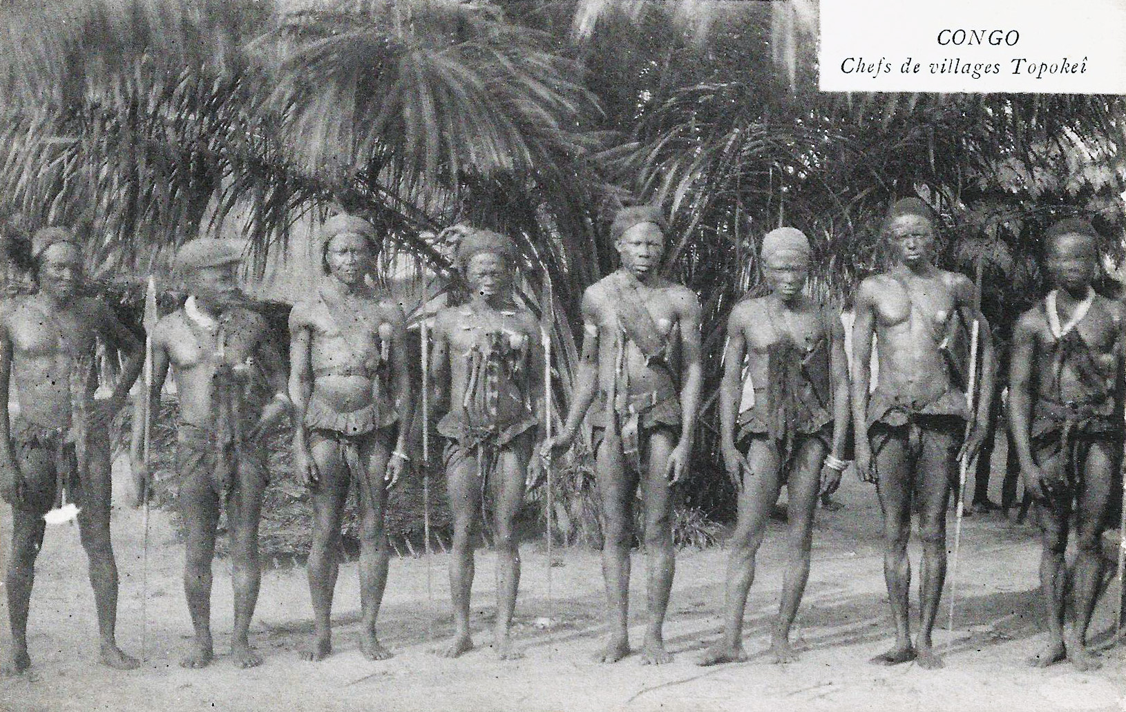 Chefs de villages Topokei. Congo pas de mention d'auteur, d'éditeur ou de date